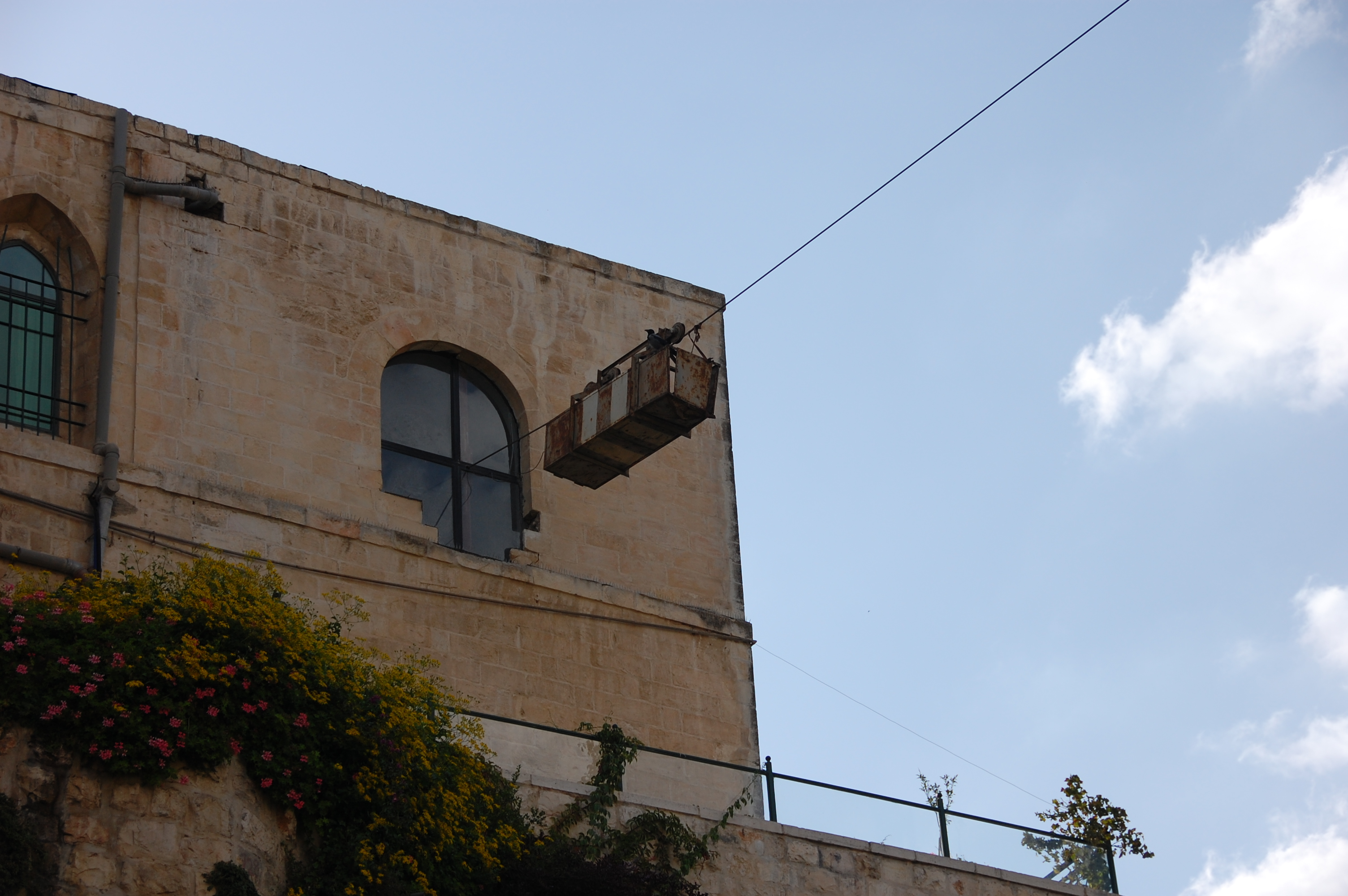 cable over ben hinom vally